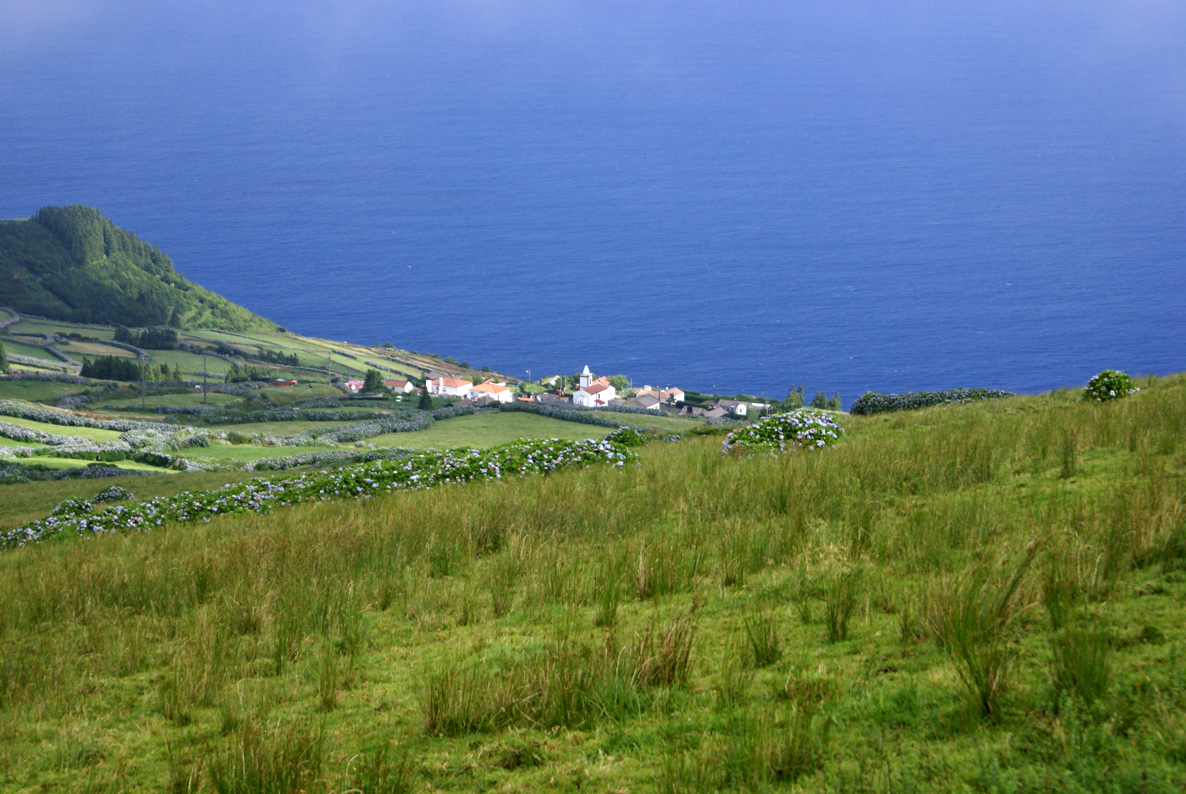 Toledo, vista parcial, Velas, ilha de São Jorge, Açores